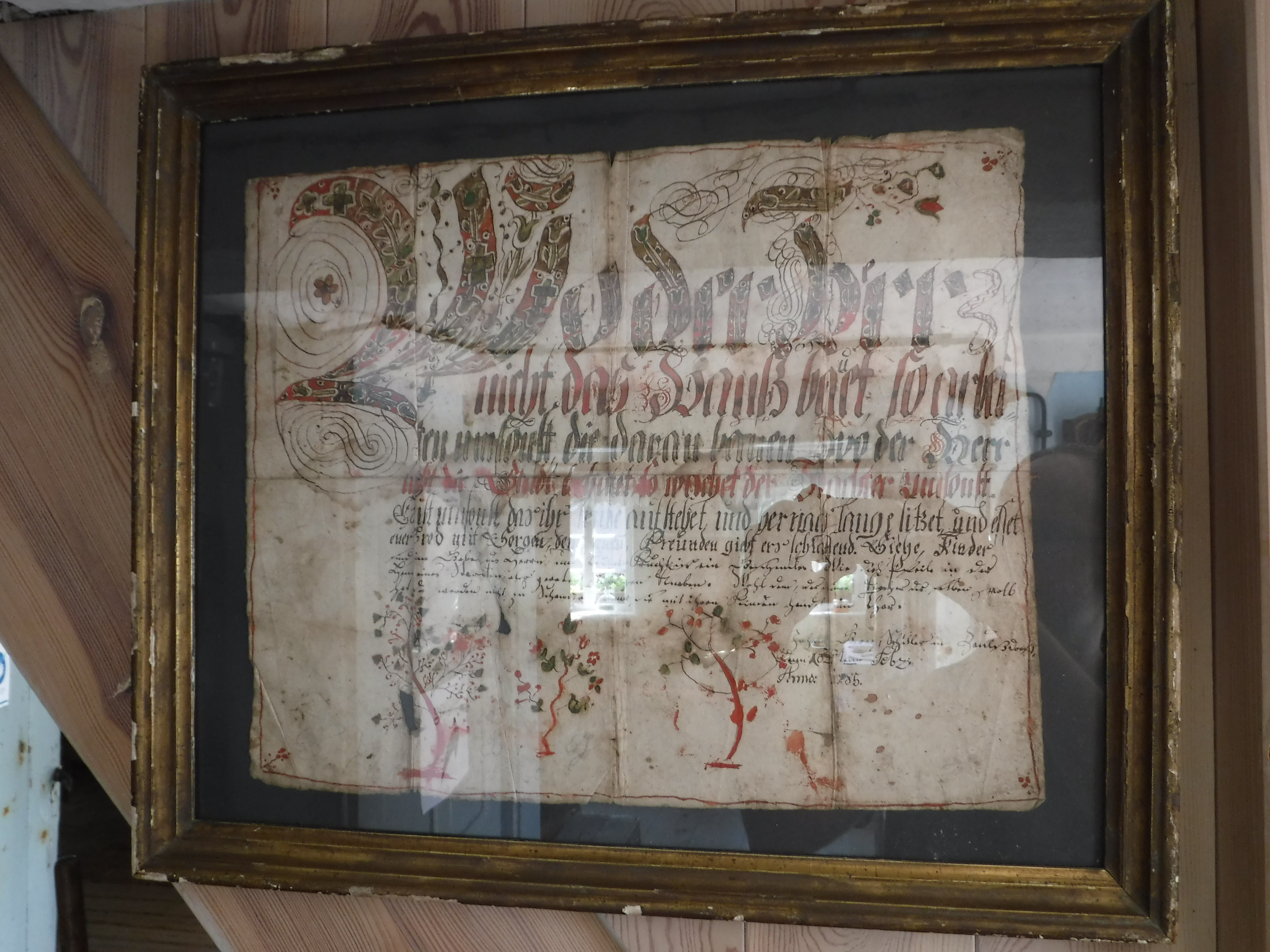 Haussegen im Kleinbauernmuseum Dresden-Reitzendorf: "Wo der Herr nicht das Haus bauet" aus Psalm 127 in der Lutherübersetzung. Unterschrift: Johann Georg Schiller in Zaubsdorf zum 20. Febr. Anno 1785